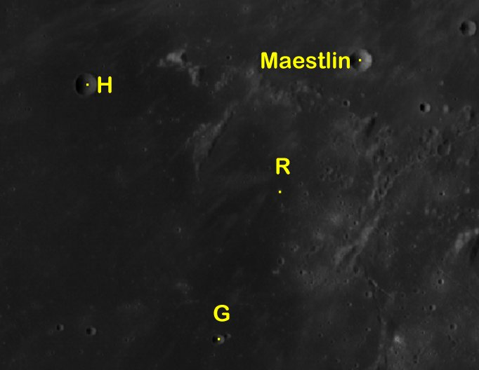 Cráter lunar Maestlin. Cráteres satélite. (Imagen LRO)